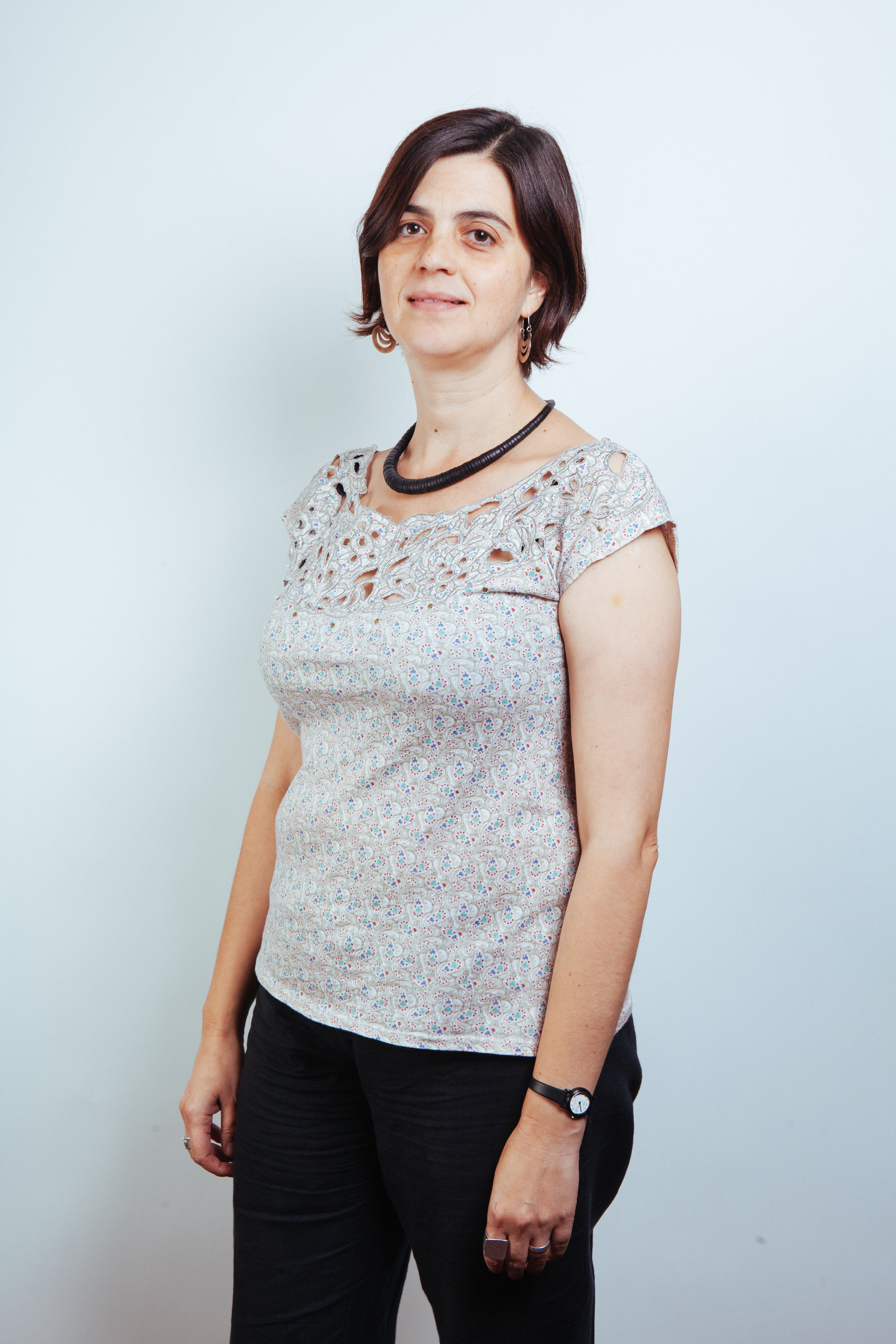 Ministro de Estado del segundo gobierno de Michelle Bachelet (2014-2018)